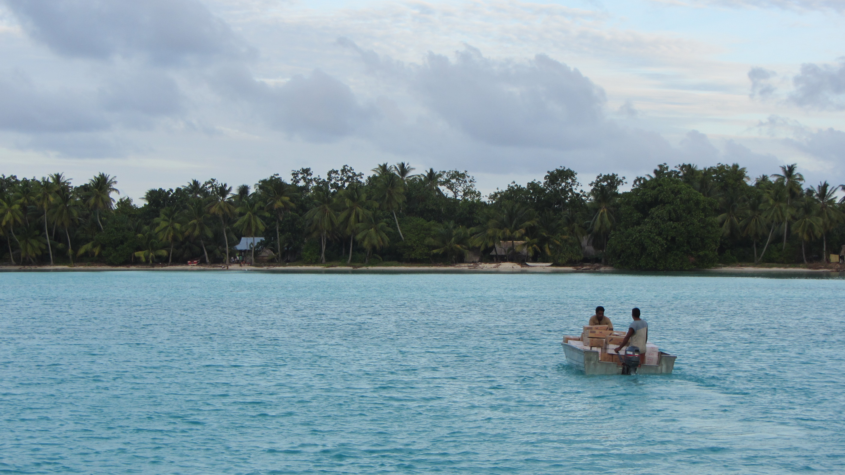 Abaiang